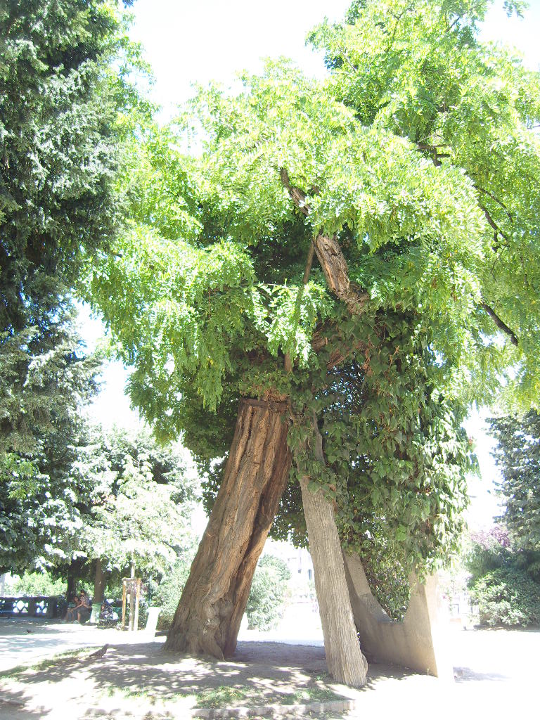 Le plus ancien arbre de Paris, un robinier planté en 1601 par Robin